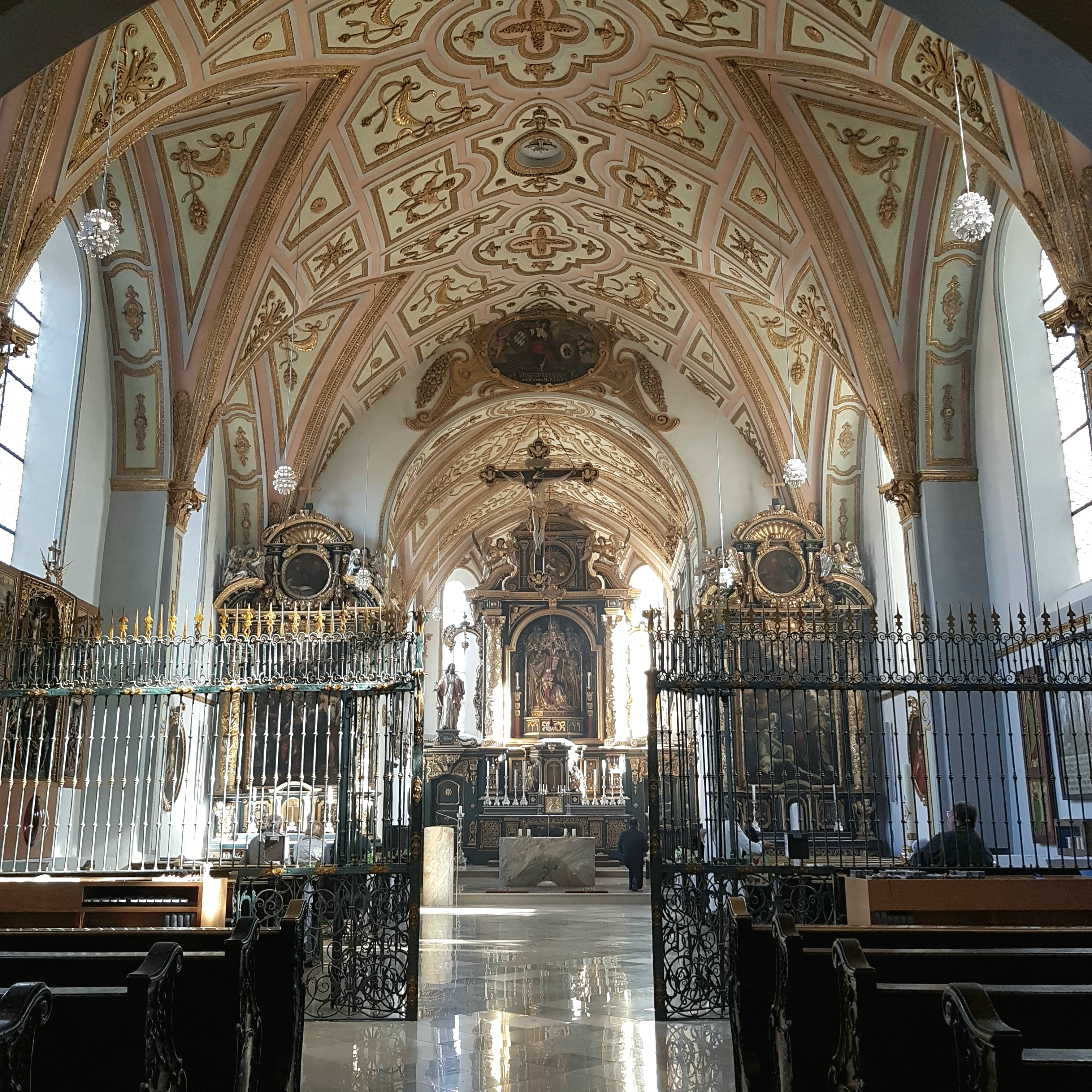 St. Maria (Ramersdorf)